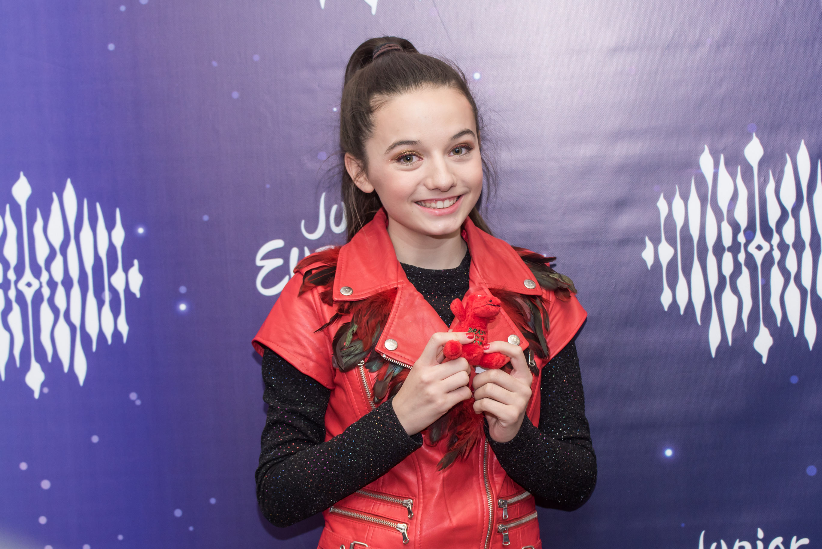 Детское Евровидение 2018. (Уэльс) Manw